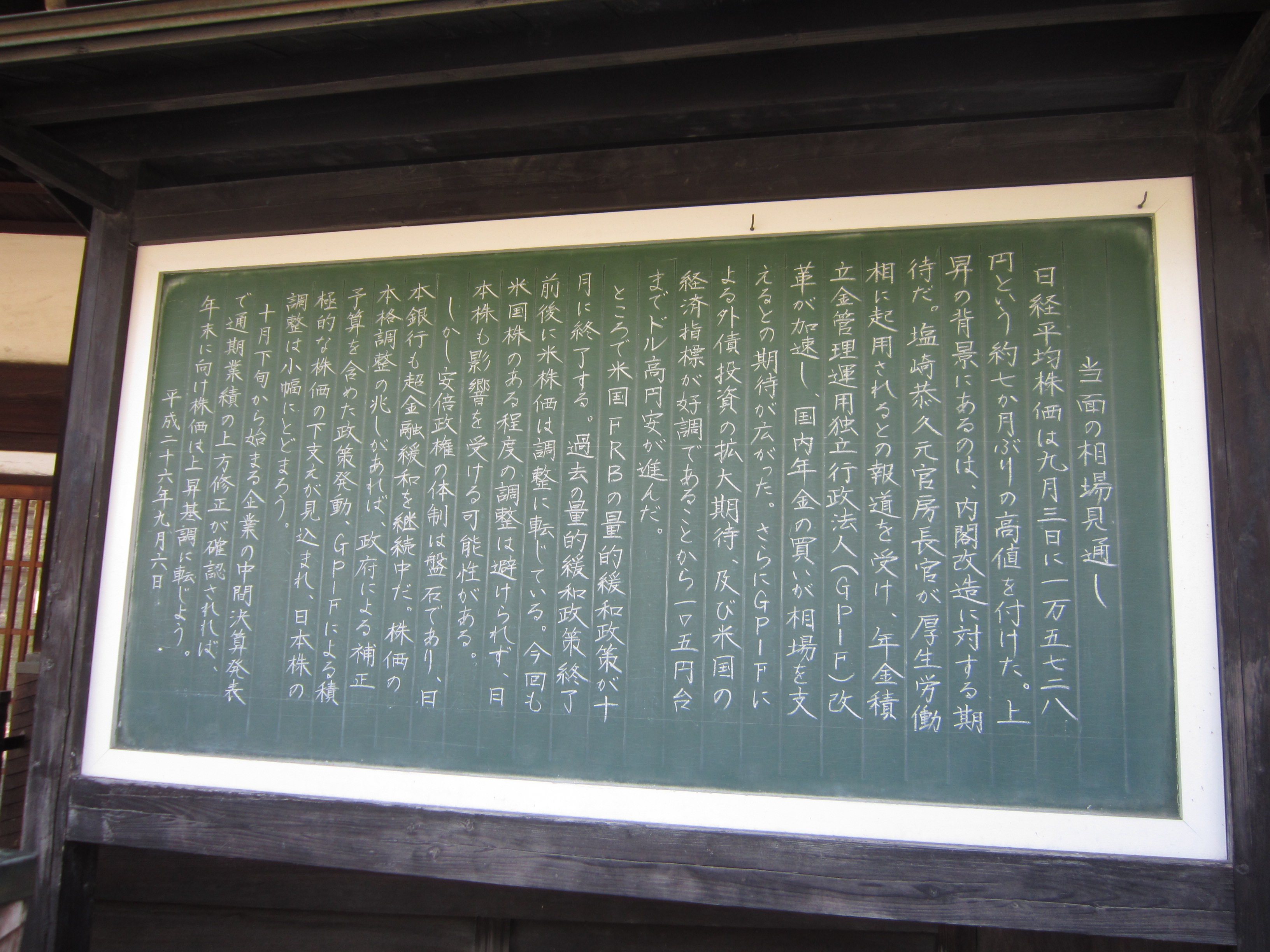 刊於美觀地區某處民宅外，以粉筆寫就的近日股市行情